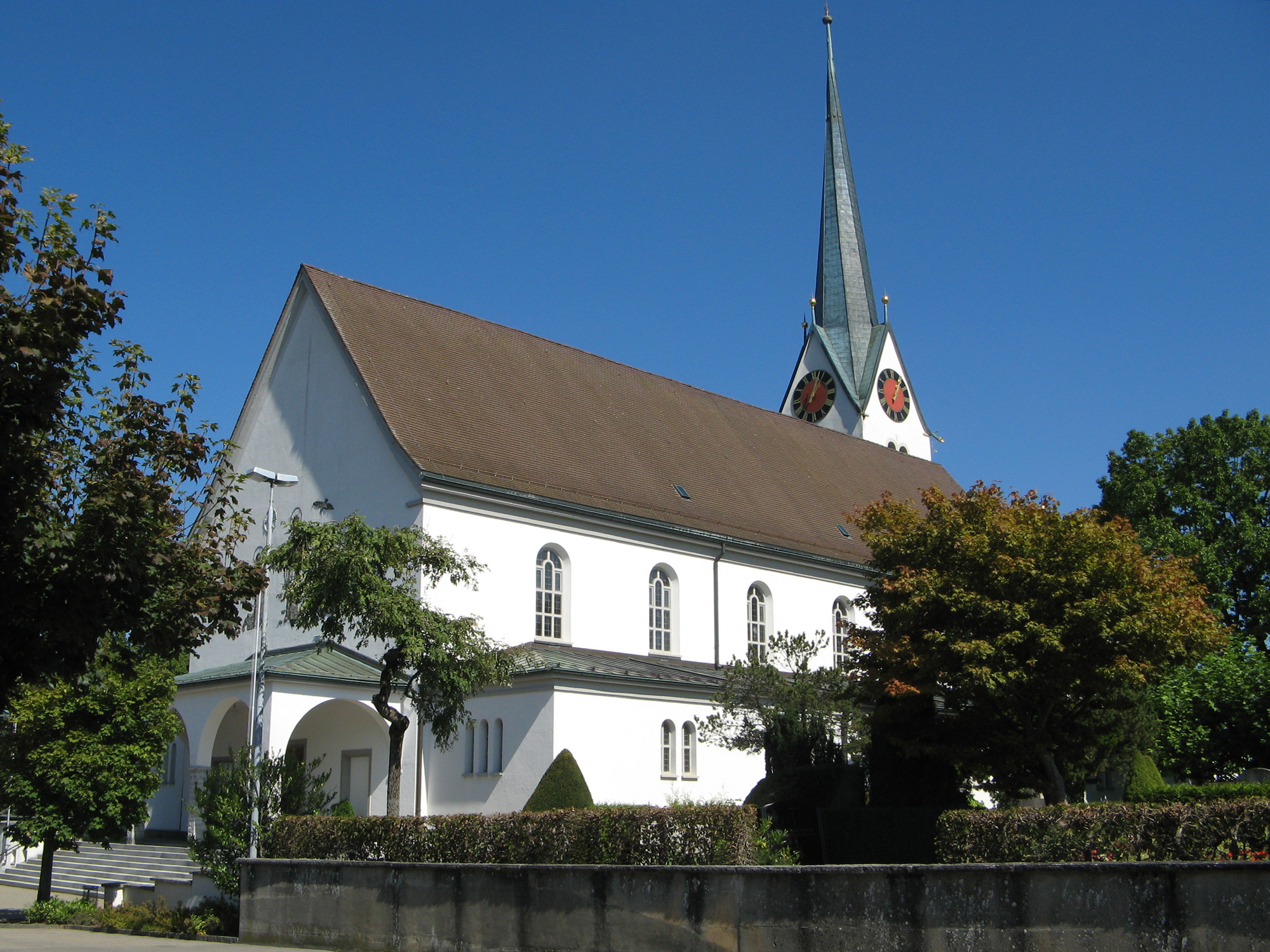 Aussenansicht der Pfarrkirche St. Goar in Muri